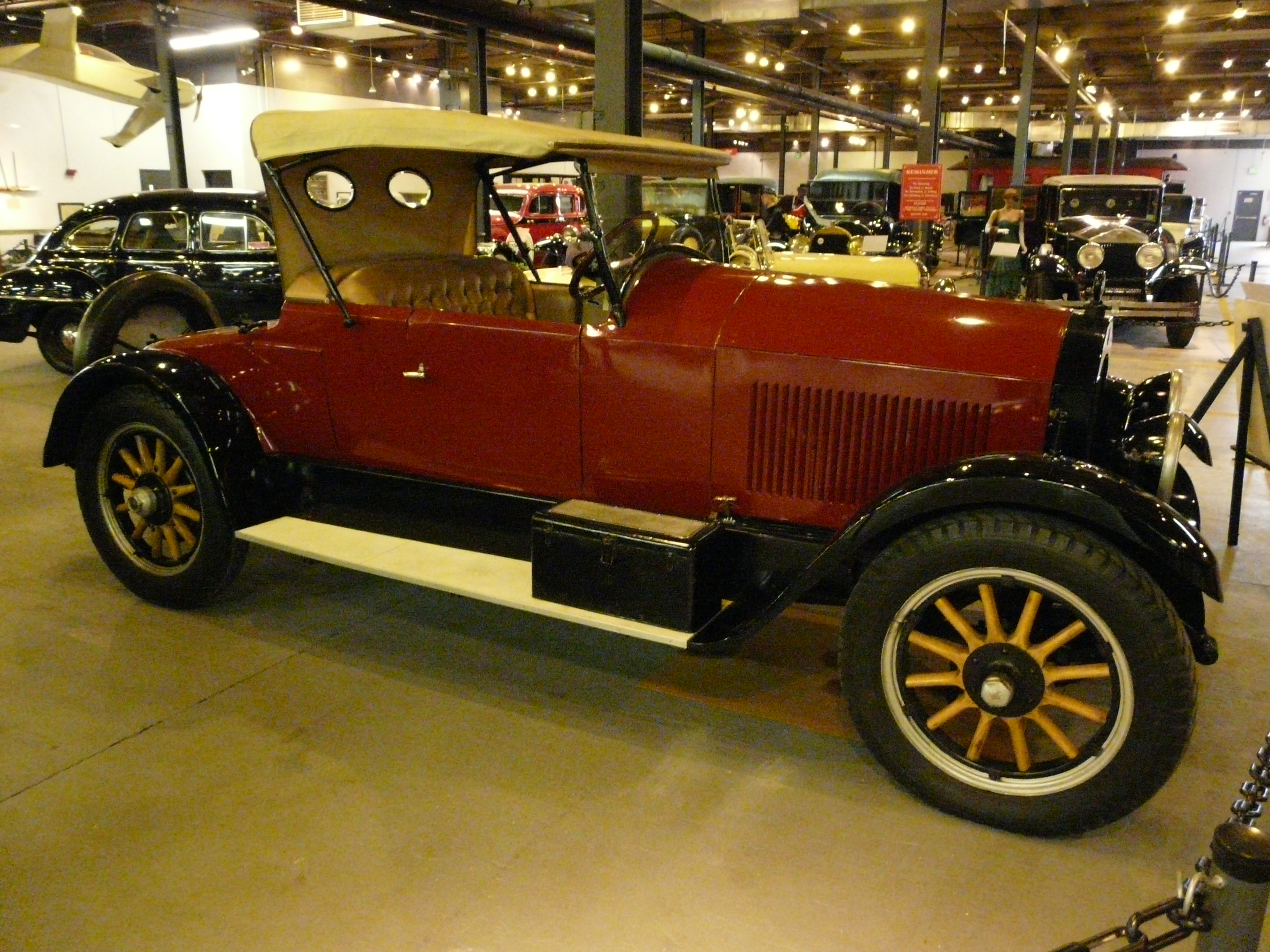 Denver, summer 2012